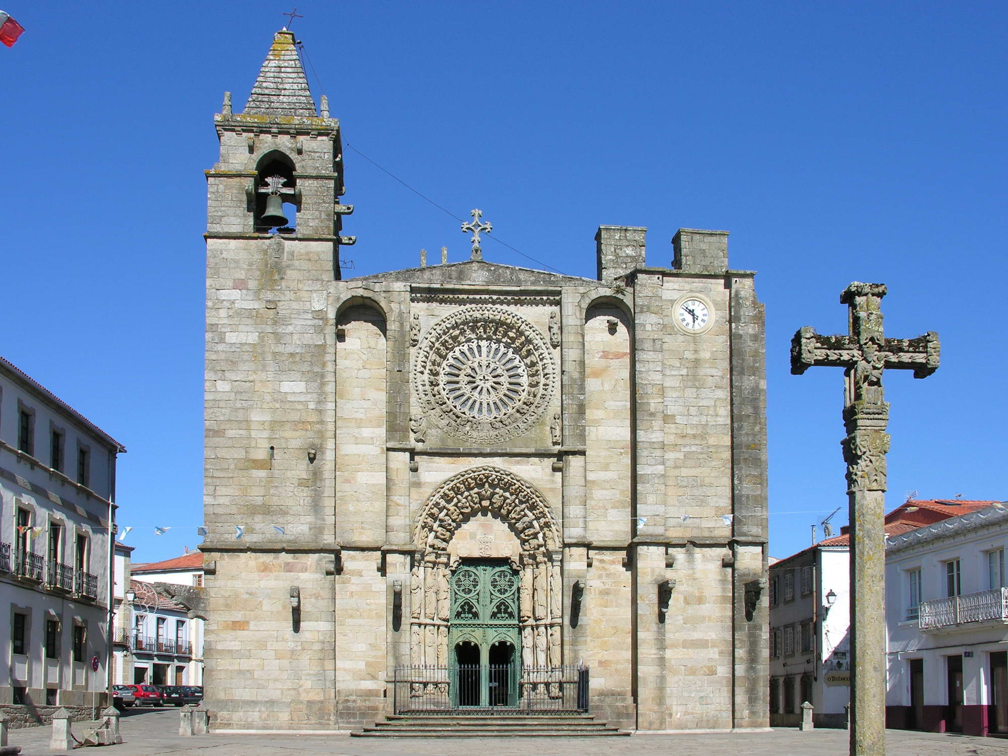 Igrexa principal de Noia, Galicia Publish by= Luis Miguel Bugallo Sánchez.